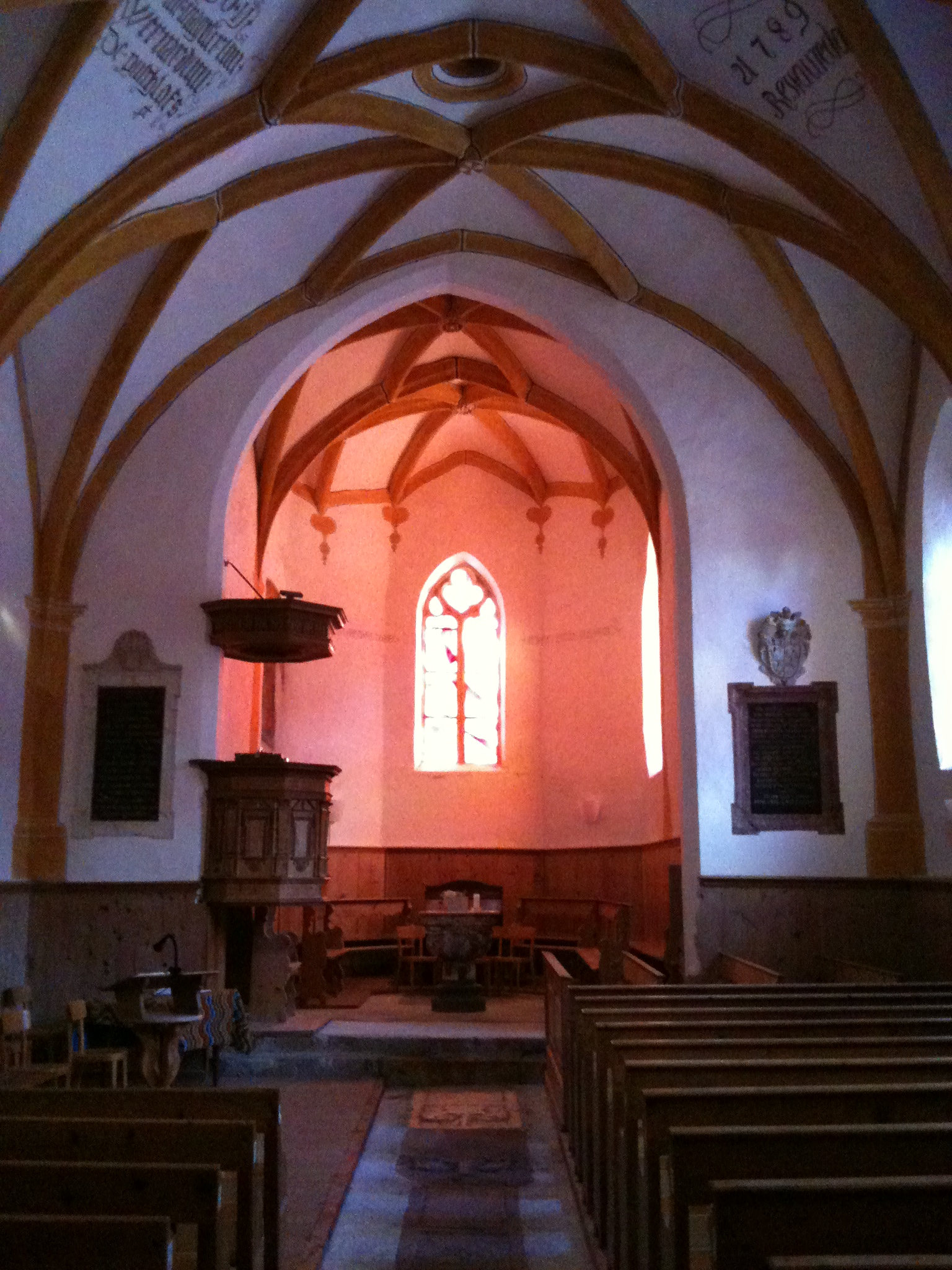 Kirche in Chamues-ch, Engadin, Kanton Graubünden, Chor im Abendlicht